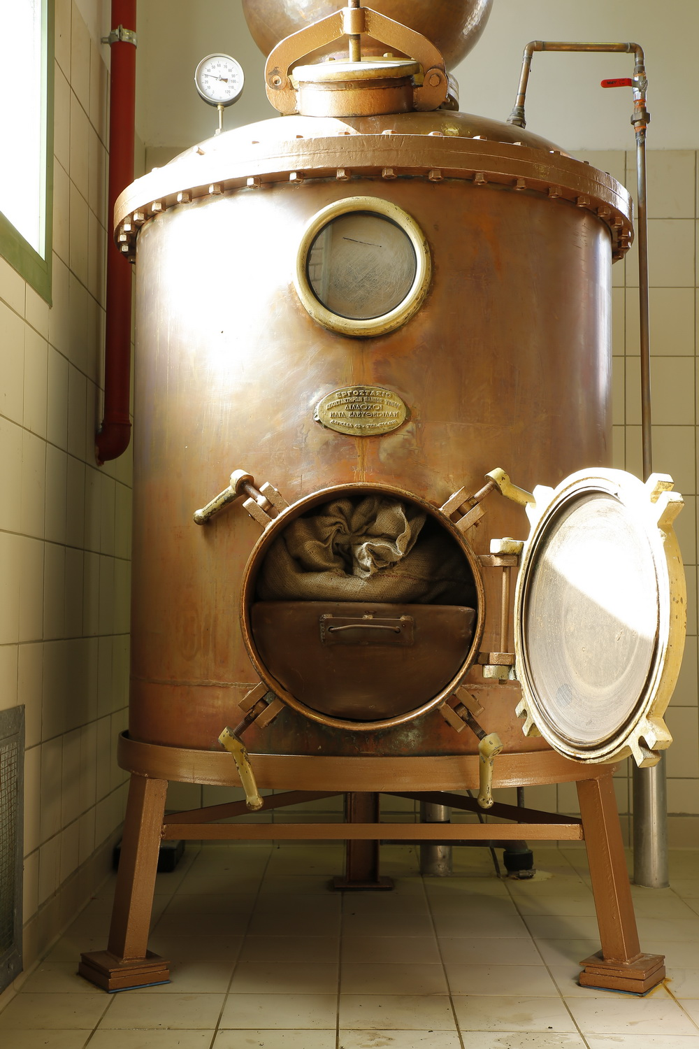 Άμβυκας απόσταξης ούζου